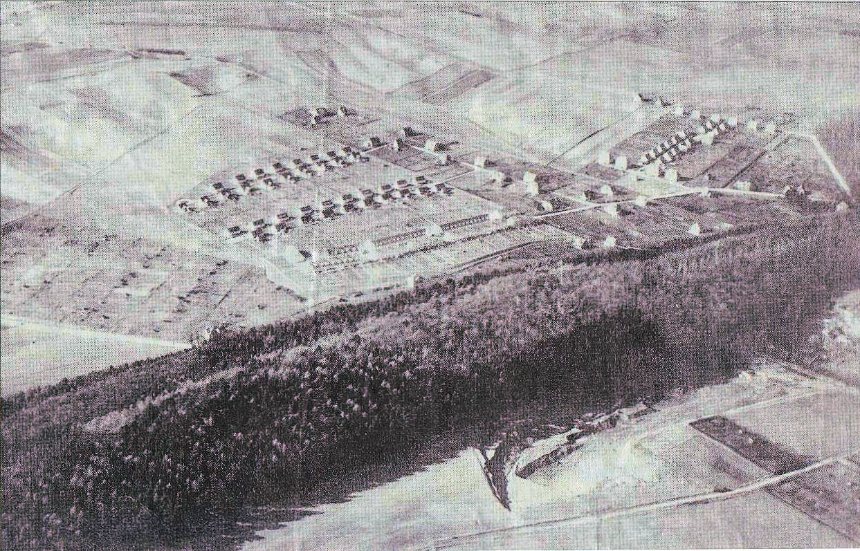 Luftbildaufnahme der Siedlung Birnbaumskamp. Darunter der Steiberg mit der Tonkuhle der Steinberg Ziegelei